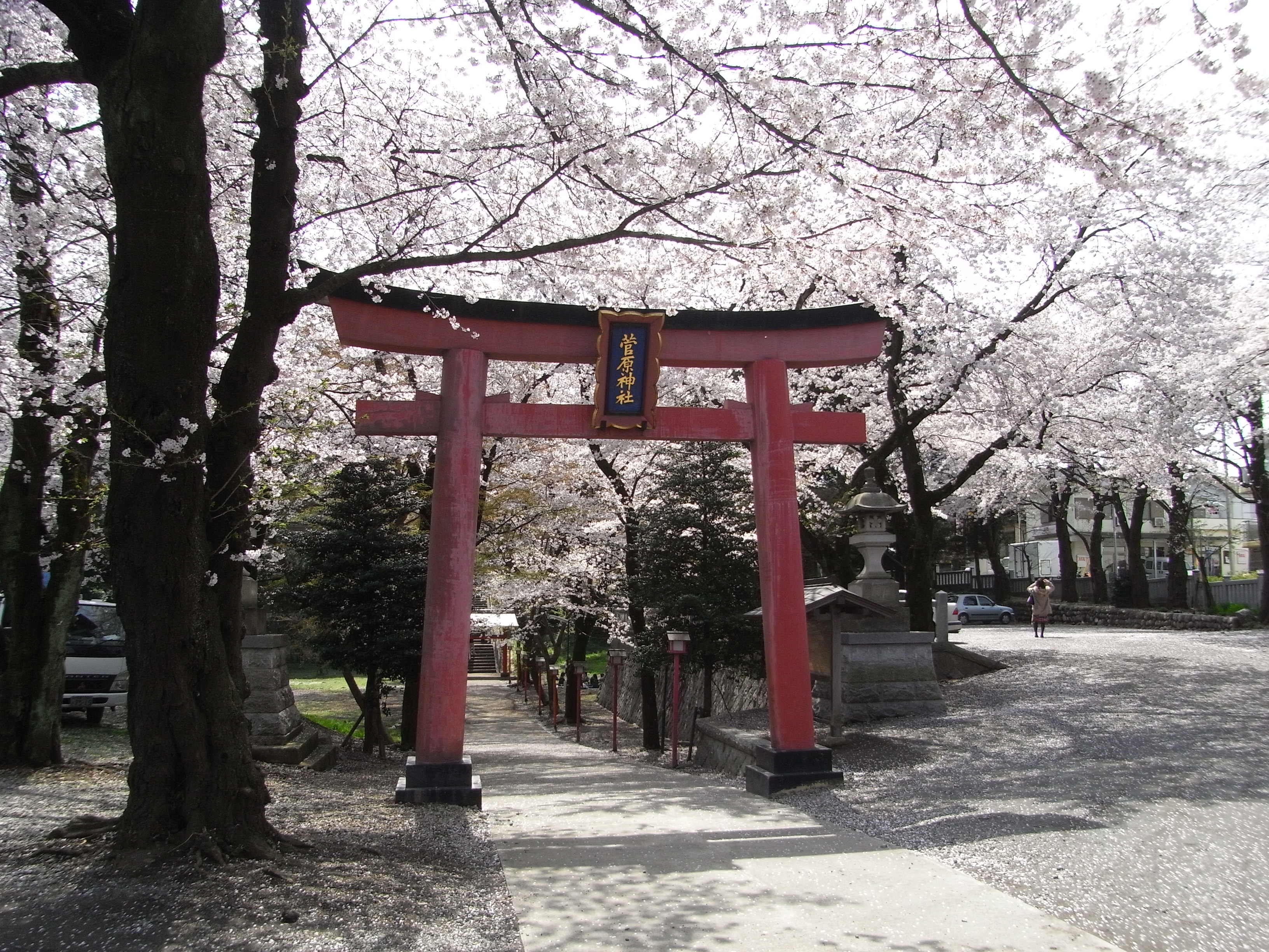 桜の咲く頃に撮影した鳥居です